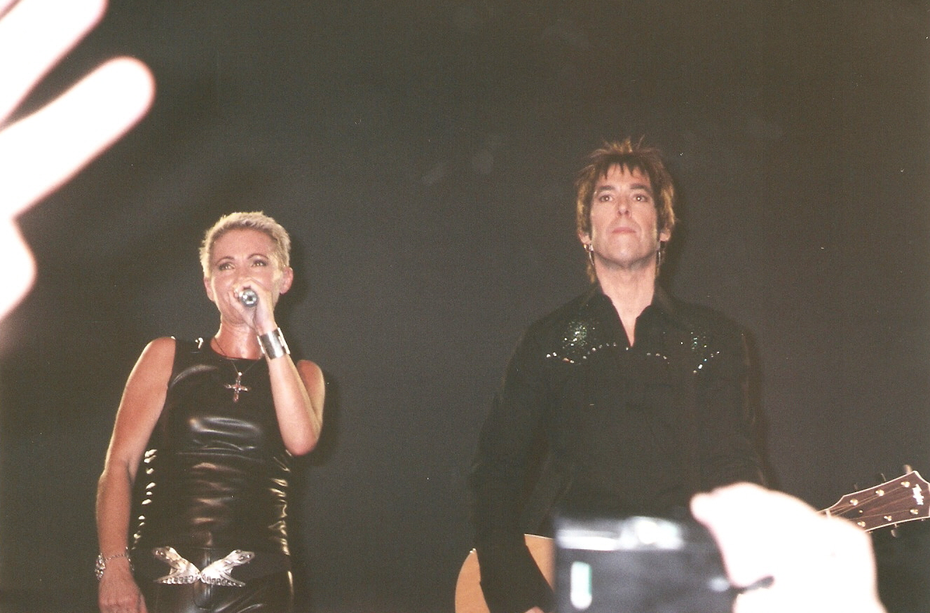 Concerto Roxette no Palau Sant Jordi, 24 de Outubro de 2001